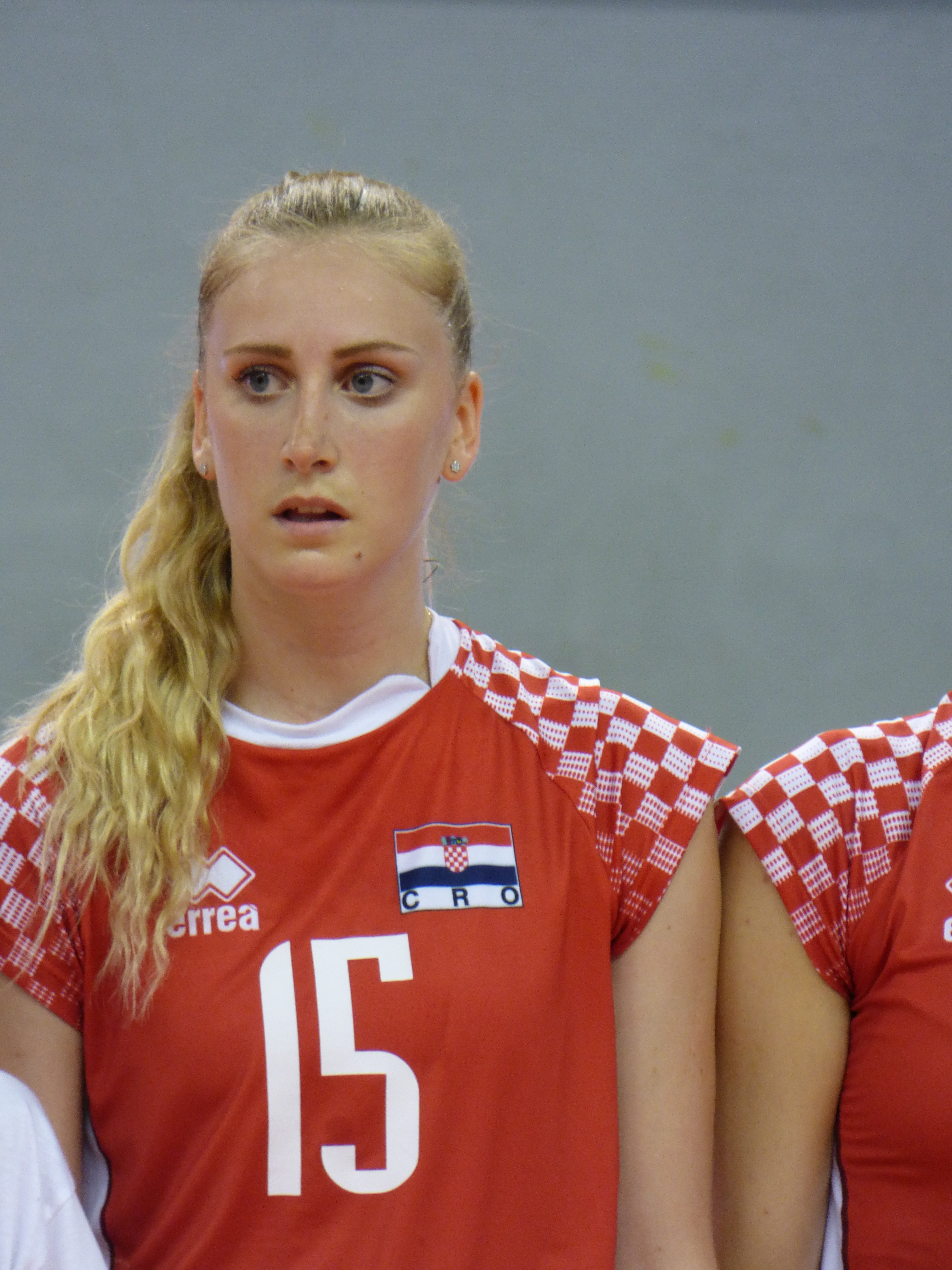 Sur le terrain du VNVB à Vandoeuvre et deux joueuses du VNVB